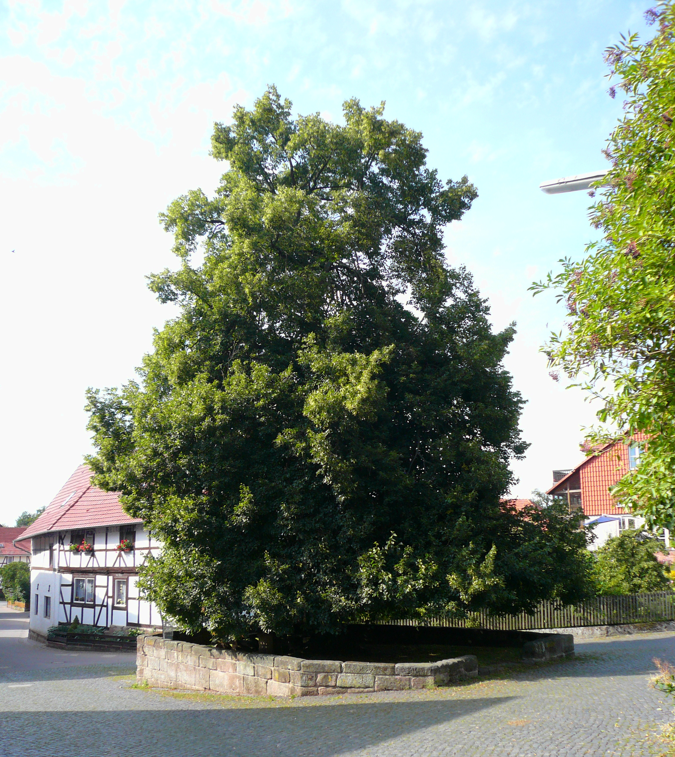 Tieplatz in Weißenborn, Gemeinde Gleichen, Niedersachsen